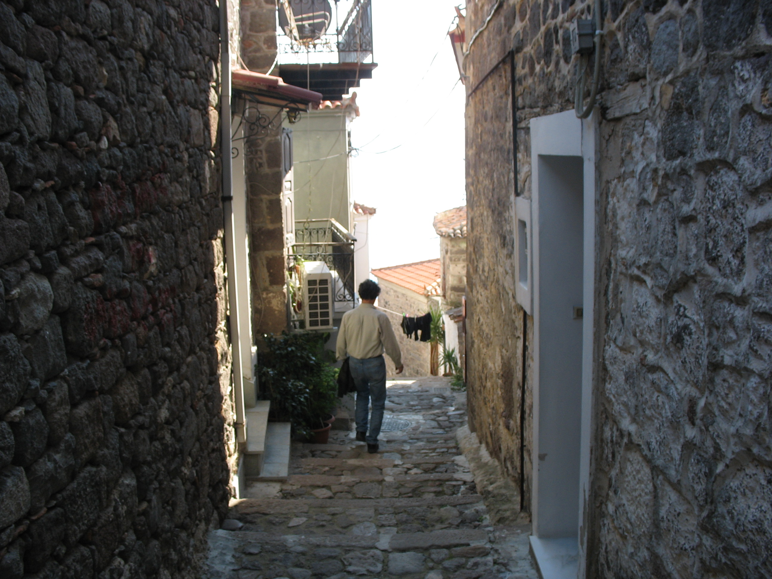 Moluvos kalnterimi